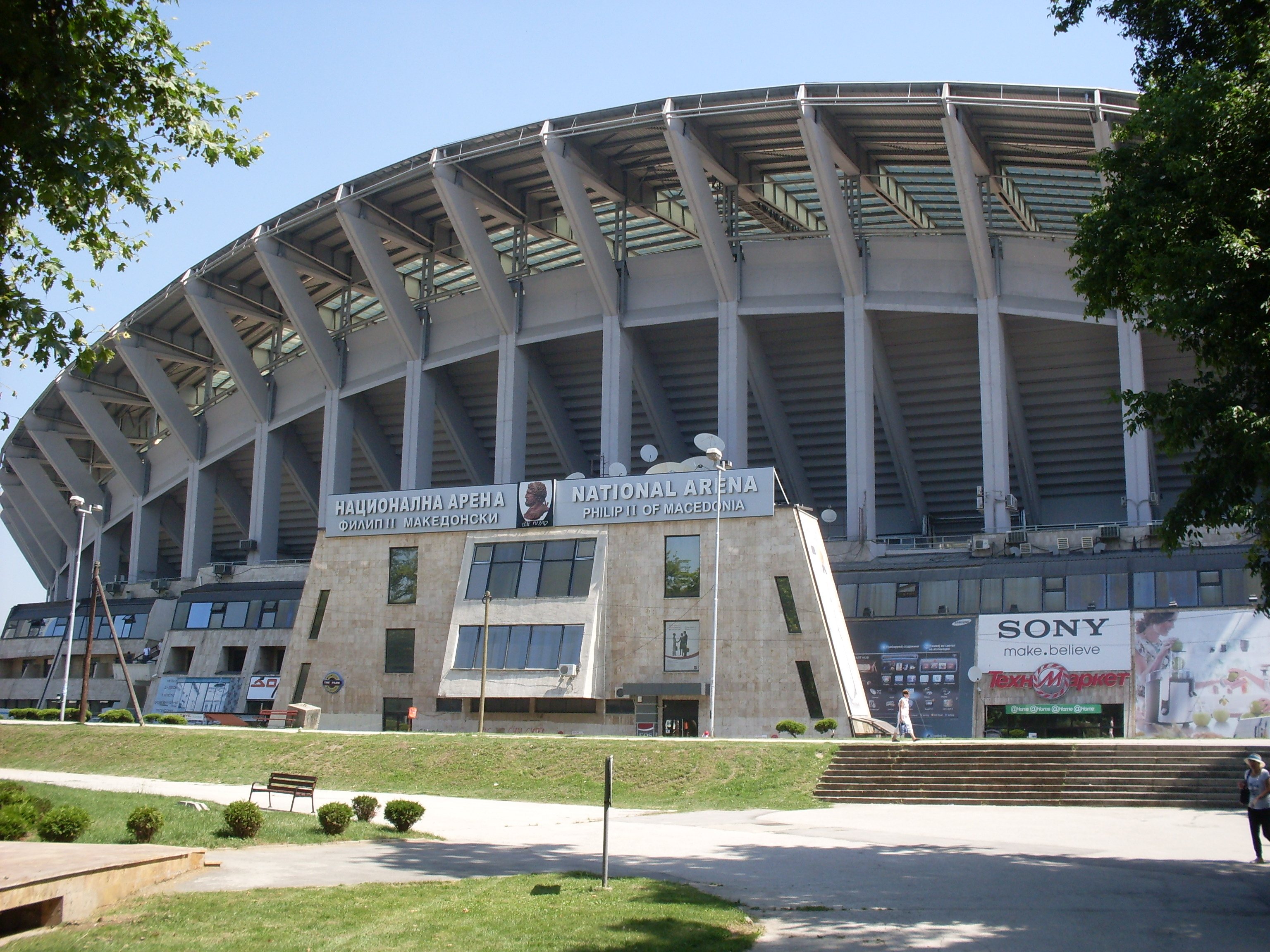 National Arena Skopje